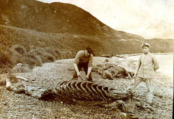 Aurelio Pozzi en la costa de la Bahía Cumberland, (costa norte de las Georgias del Sur) descarnando con un cuchillo los huesos de un esqueleto de elefante marino del sur, macho, Mirounga leonina, de aprox. 5 mts de longitud, posiblemente muerto por los cazadores comerciales de elefantes. A su derecha observando está Marotto, Jefe de Máquinas del “Guardia Nacional”. Hoy en dia las islas Georgias del Sur cuentan con la población reproductora mas numerosa del Atlántico SO y de la Subantártida. La Compañía Argentina de Pesca estaba situada en el Puerto de Grytviken, en la misma bahia (Año 1924).